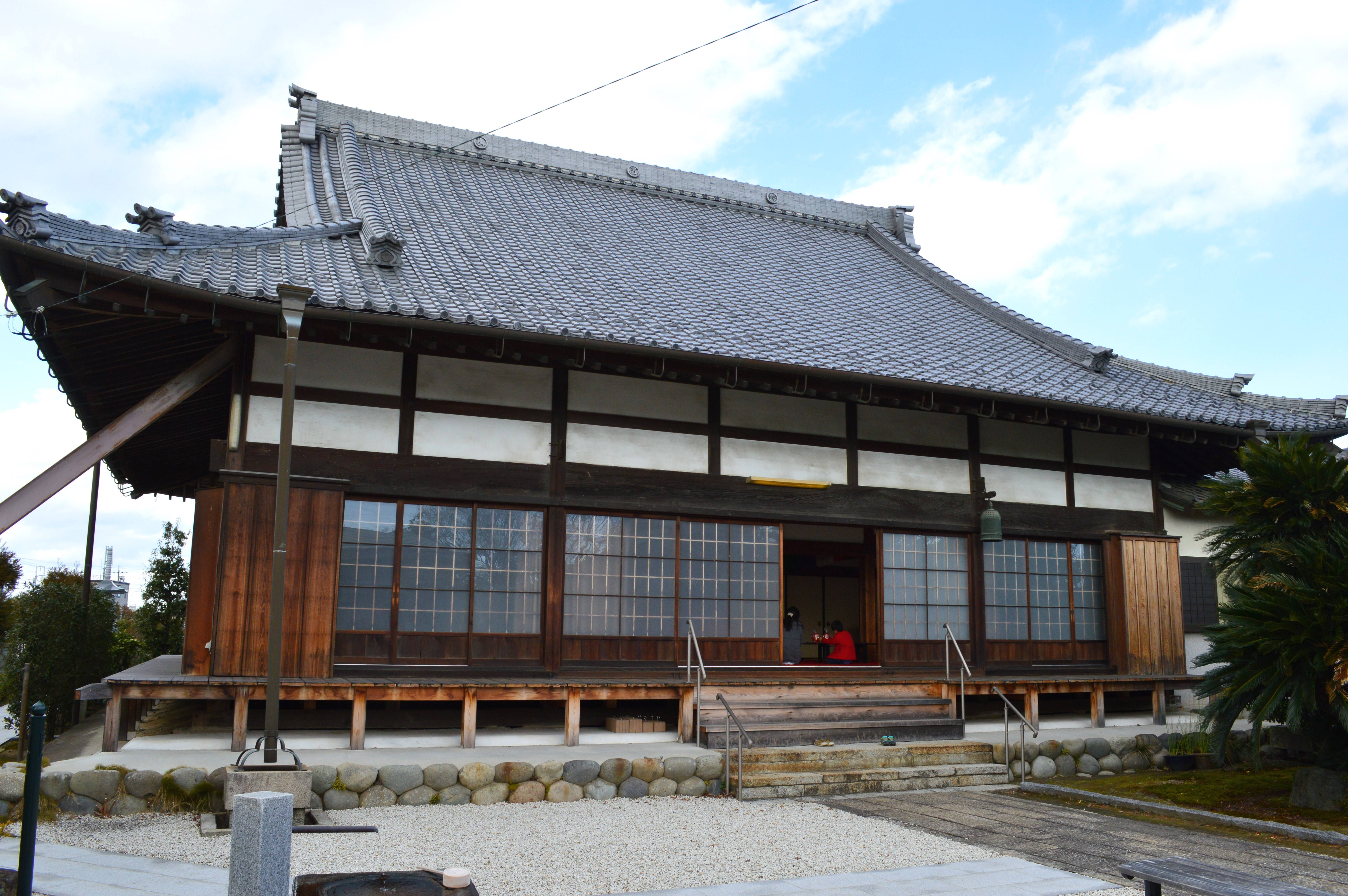 尾張国分寺 本堂